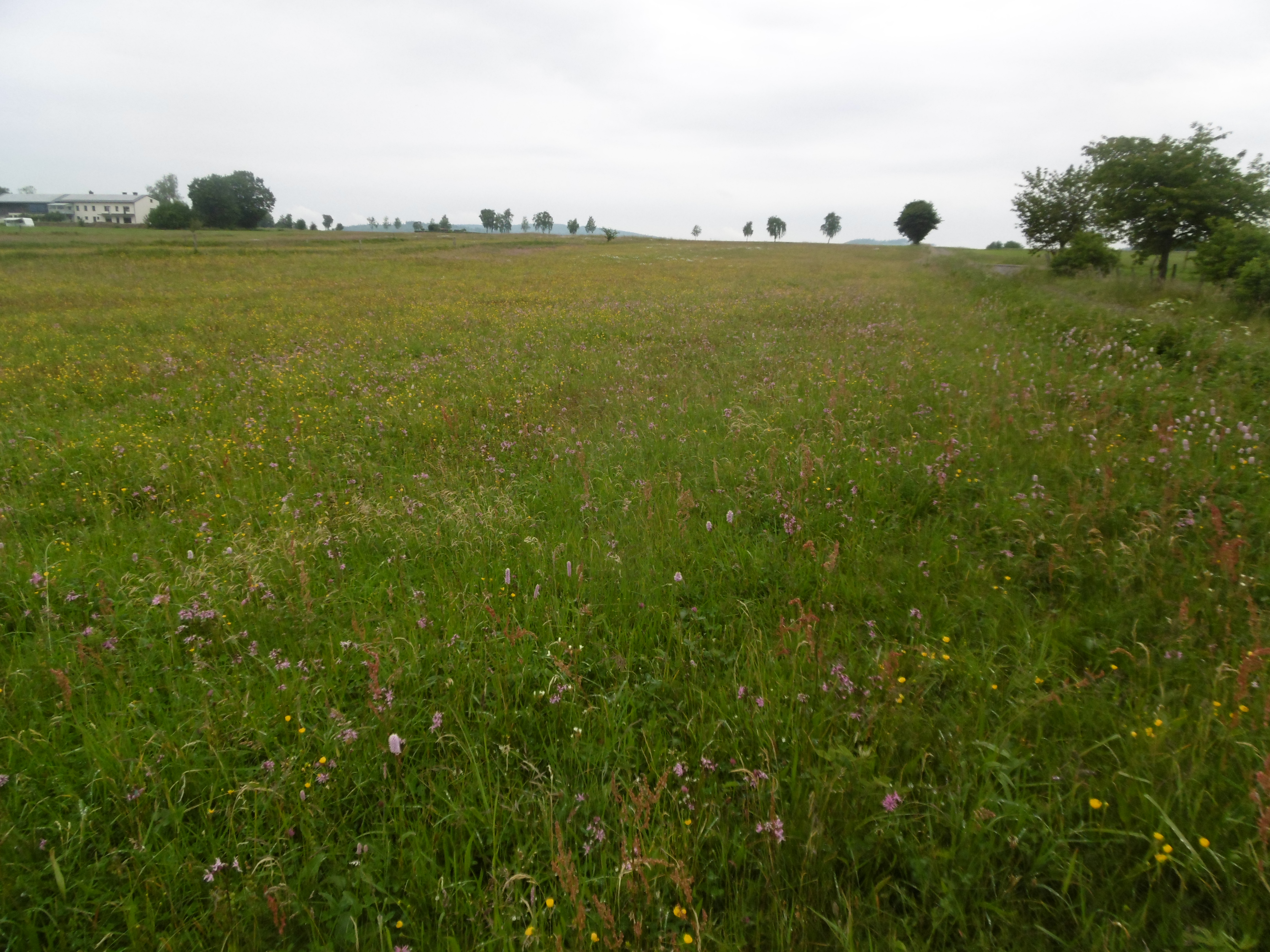 Bereich Pitzfeld im Besitz der NRW-Stiftung im Naturschutzgebiet Medebach-Frauenbruch. Naturschutzgebiet Medebach-Frauenbruch Gute Bilder Erweitert ... Naturschutzgebiet Medebach-Frauenbruch Gute Bilder Erweitert ... Pitzfeld